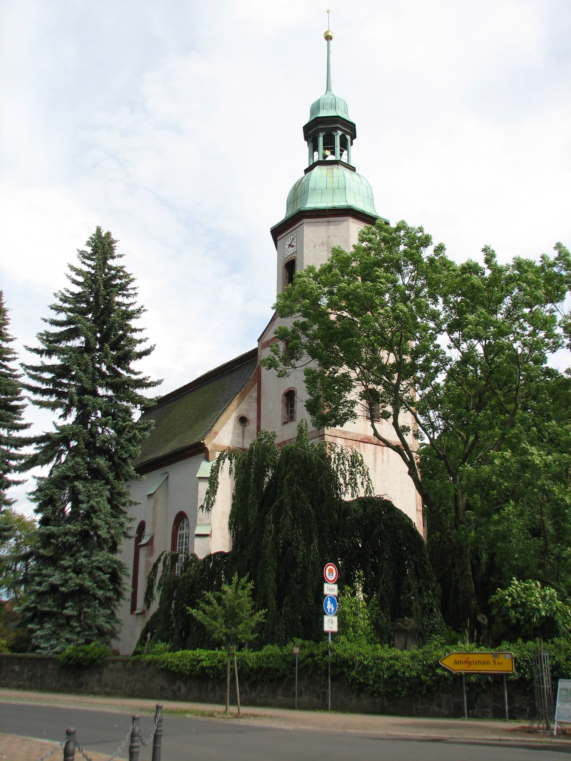 Naunhof-Kirche Gesamtansicht